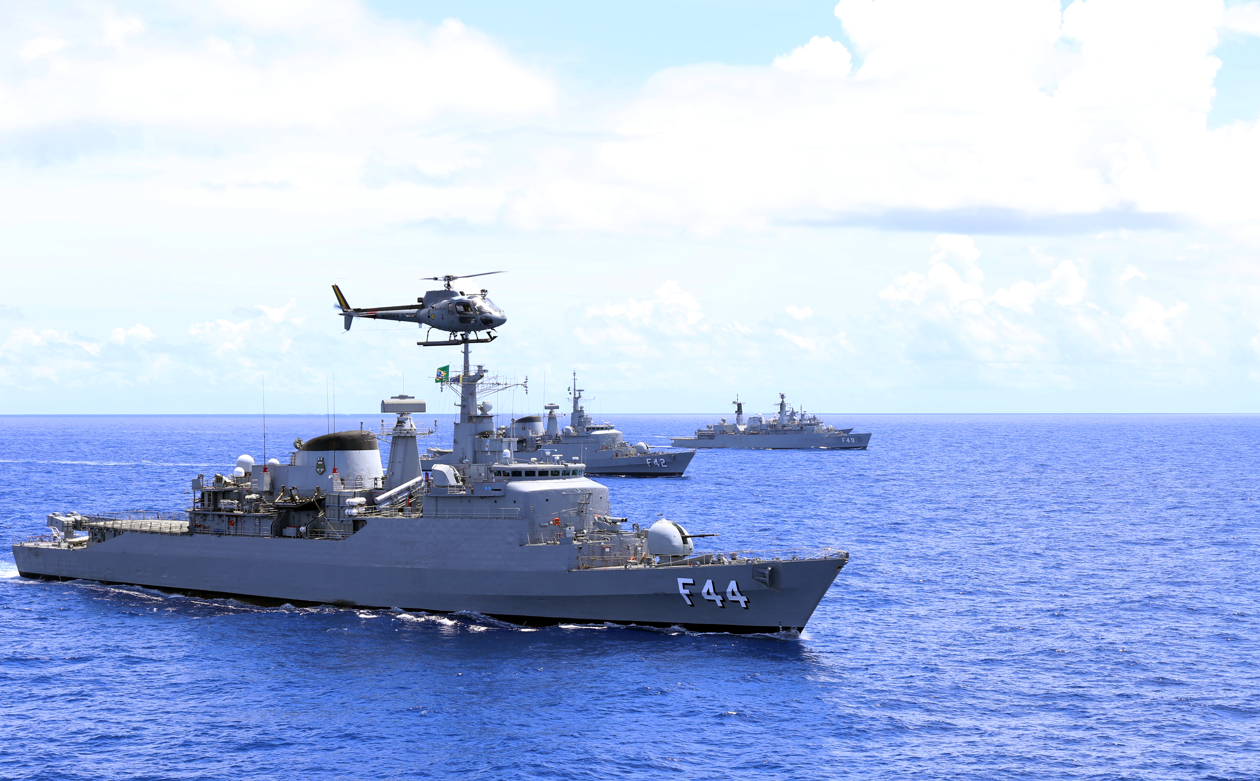 Arquivo liberado pela Marinha do Brasil através de projeto GLAM com Wiki Educação Brasil